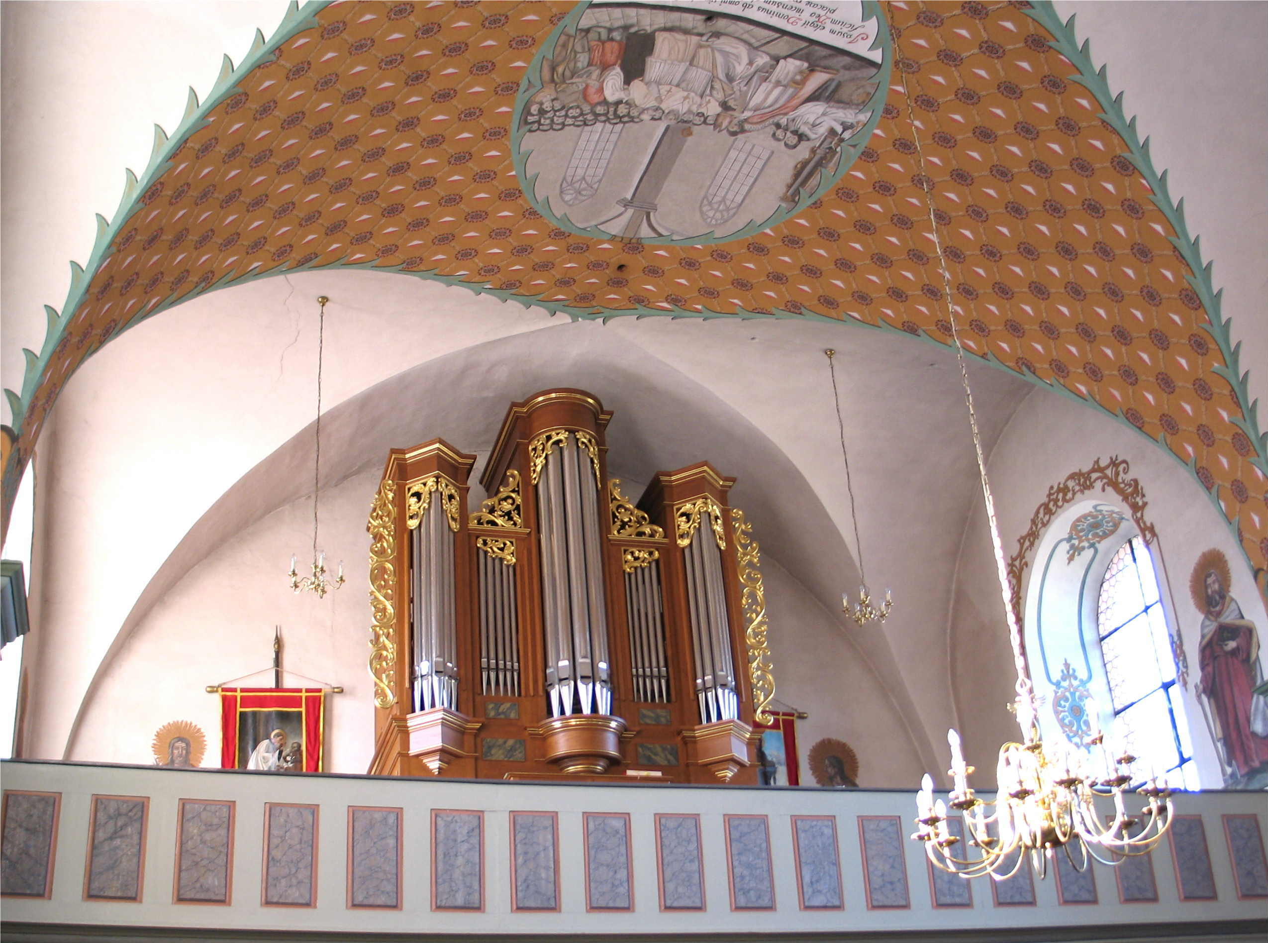 D'Uergel an der Kierch vu Butzweiler (Däitschland).